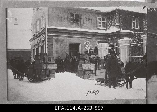 Ühistöö pakkide saatmine rindele